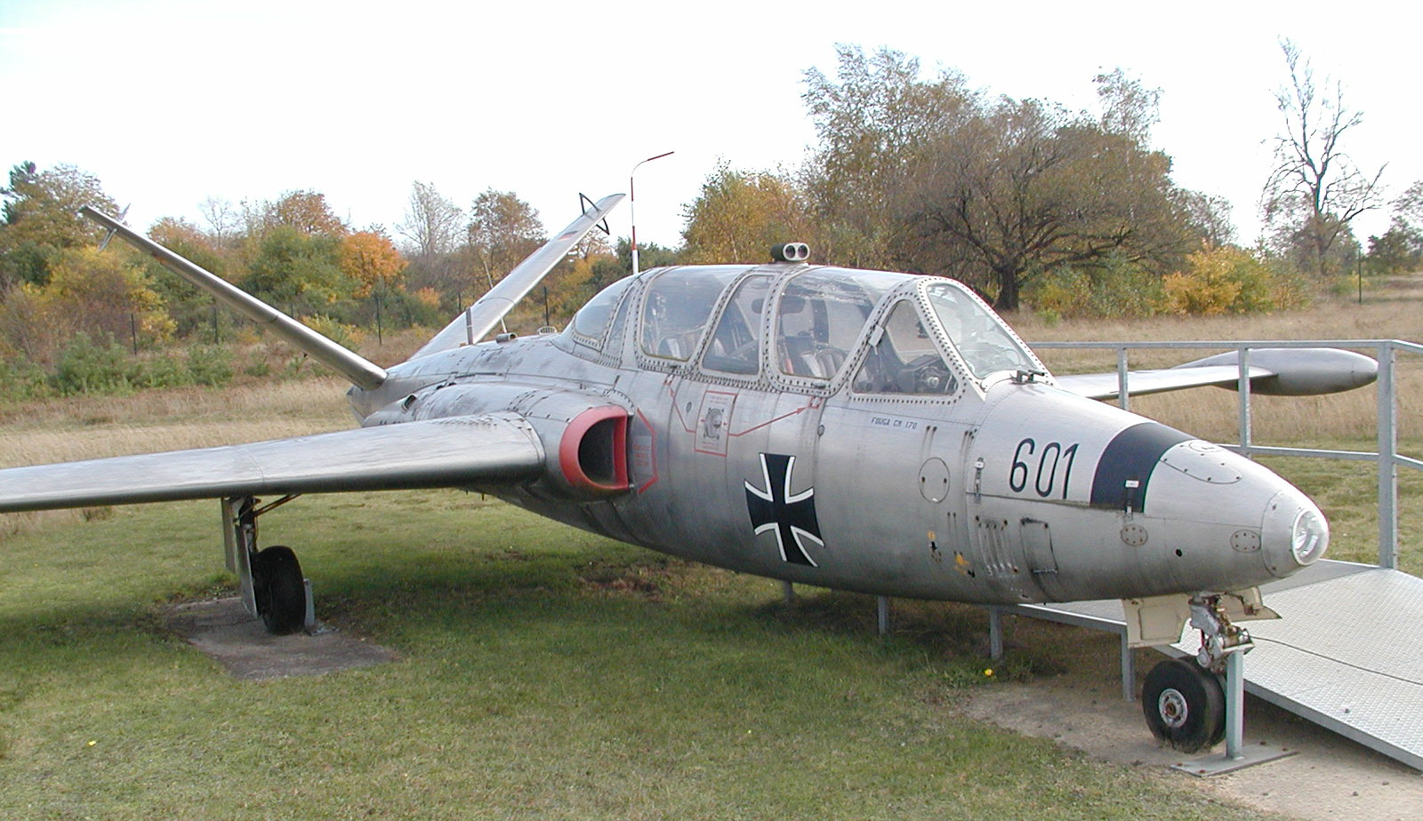 Die Fouga CM.170 Magister (SC+601) im Aeronauticum in Nordholz bei Cuxhaven